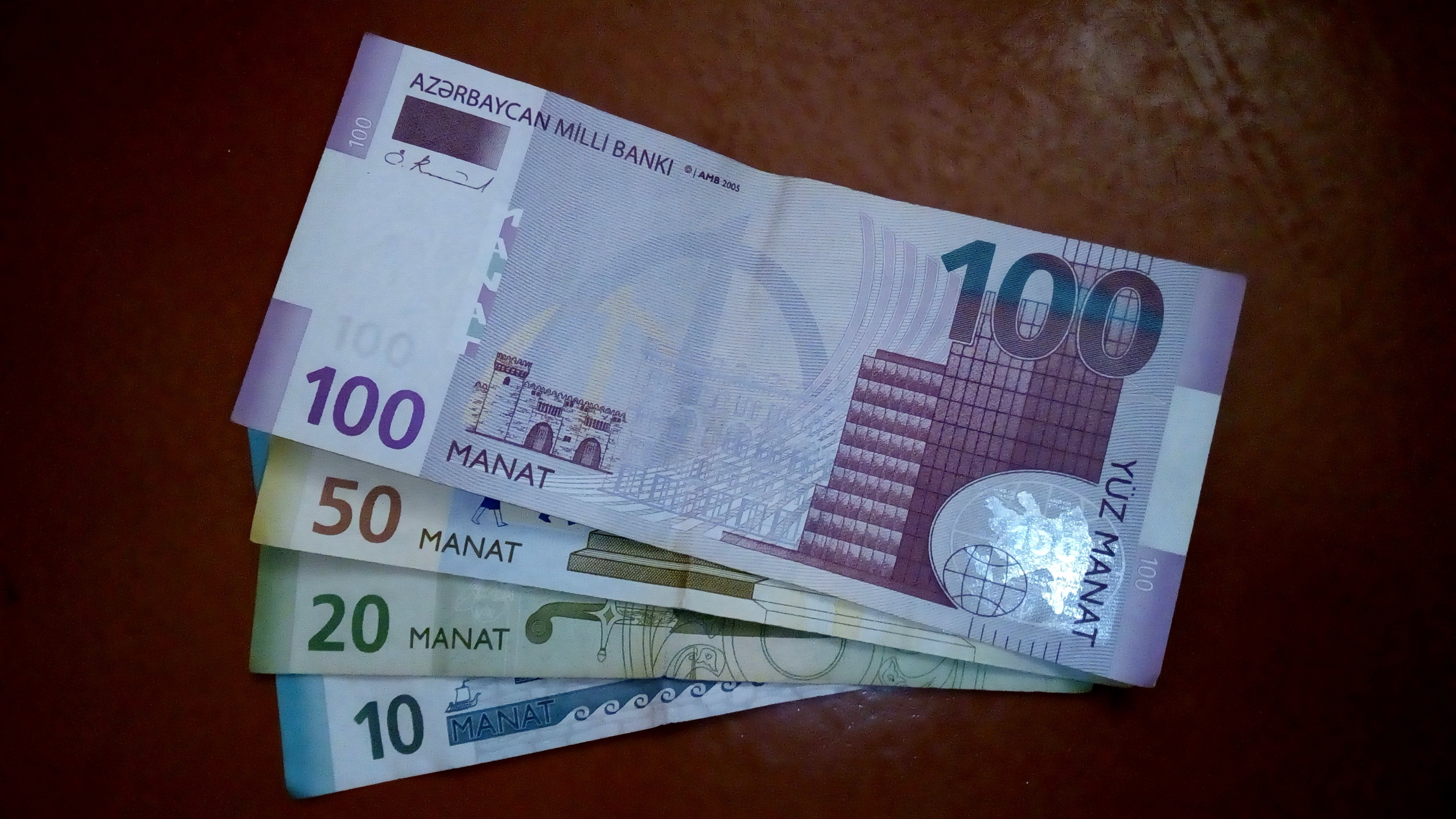 180 manat - 01.03.2019-cu ildən minimum aylıq əməkhaqqı